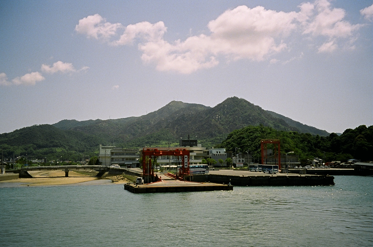 今治市大三島、宮浦港フェリー桟橋。